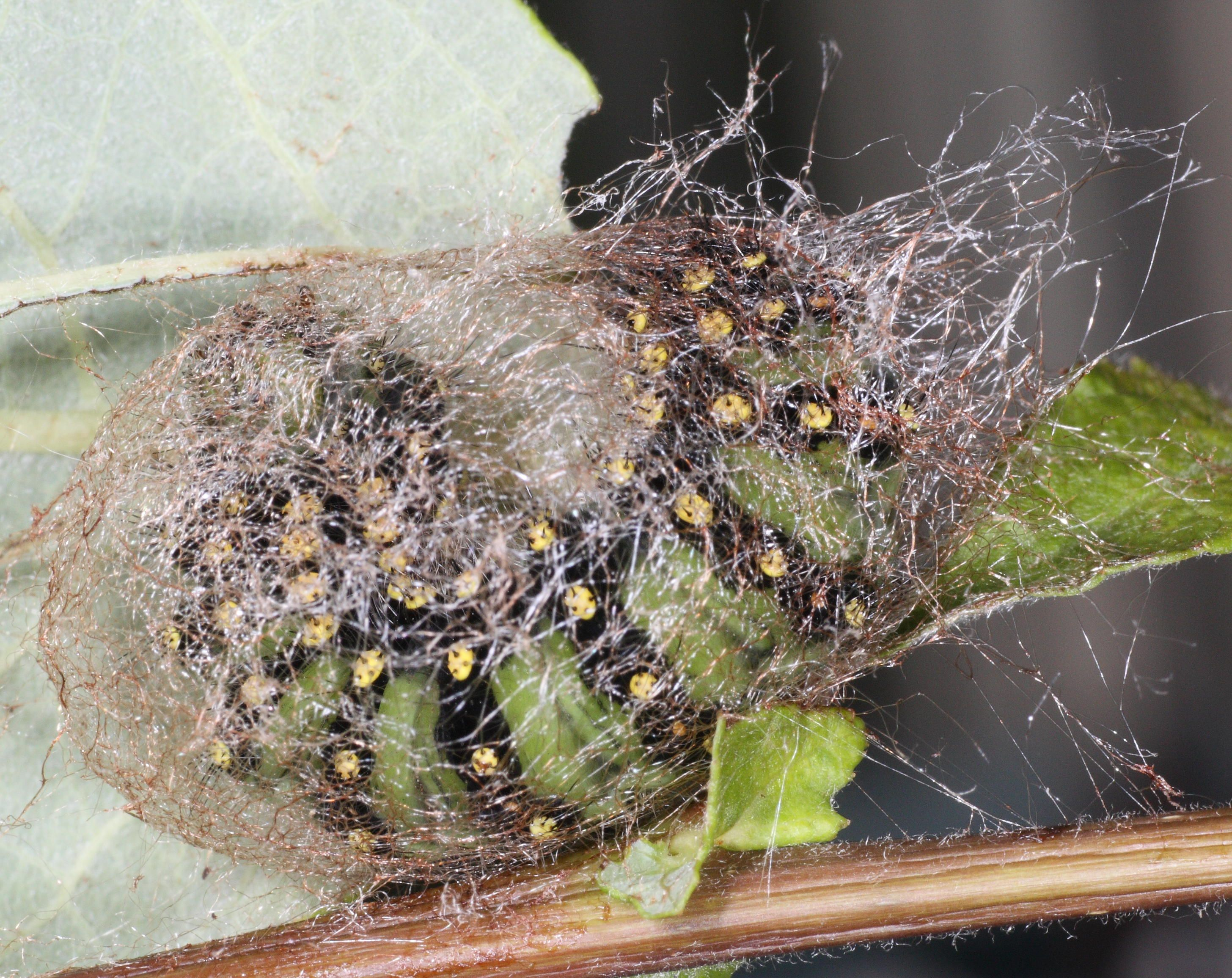 Larver av nattpåfugløye Saturnia pavonia i ferd med å spinne en puppe av et sekret fra munnkjertler. Når den er ferdig er puppen tett, brun og solid fast i blad og greiner. Template:Byline